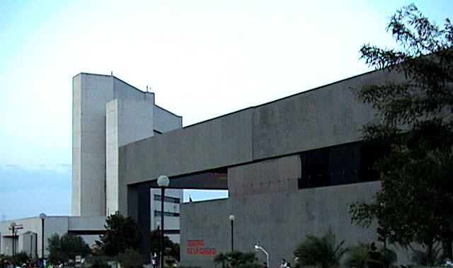 Teatro de la Ciudad obra del arquitecto Oscar Bulnes Valero